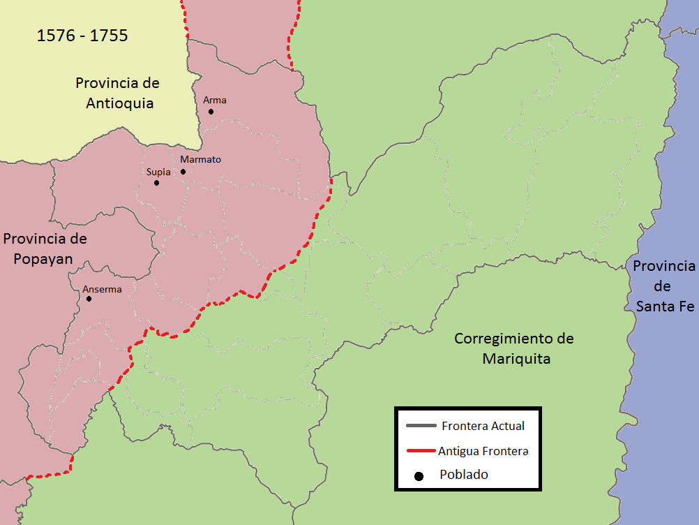 caldas entre 1576 a 1755